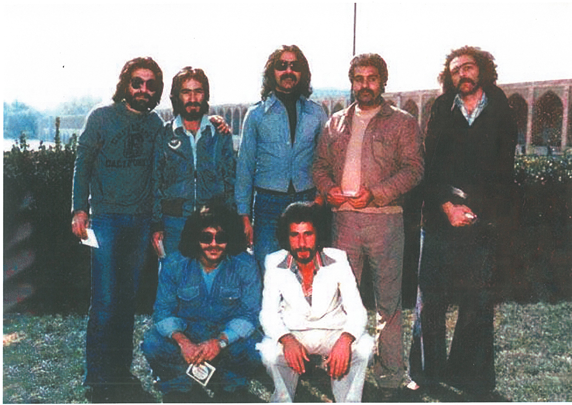 عکس دسته جمعی بازیگران در اصفهان - کوروش یغمایی - اندی و علی اکبر گلپایگانی